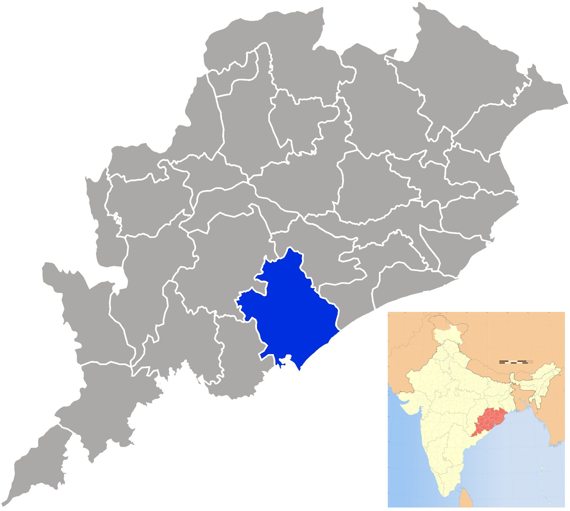 Ganjam district in Orissa